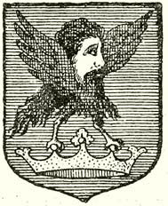 MÁRKI SÁNDOR DÓSA GYÖRGY 1470-1514 A MAGYAR TUDOMÁNYOS AKADÉMIA SEGÉLYEZÉSÉVEL KIADJA A MAGYAR TÖRTÉNELMI TÁRSULAT SZERKESZTI DR. DÉZSI LAJOS BUDAPEST AZ ATHENAEUM R.-T. KÖNYVNYOMDÁJA 1913